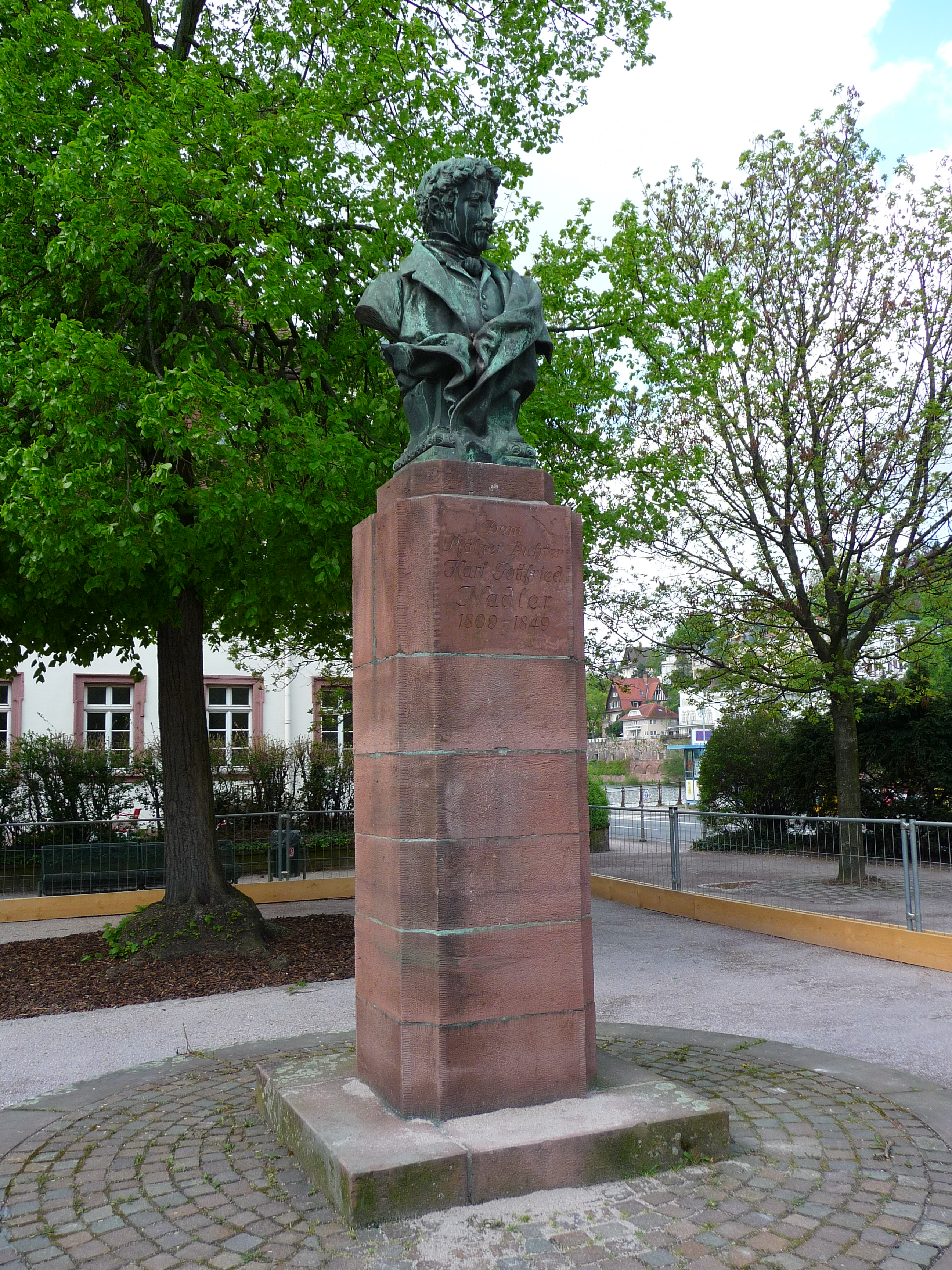 Büste des Pfälzer Dichters Karl Gottfried Nadler (1809-1849), aufgestellt mit Blick auf den Neckar gegenüber dem Marstall in der Heidelberger Altstadt; sein Grab befindet sich auf dem Bergfriedhof in Heidelberg